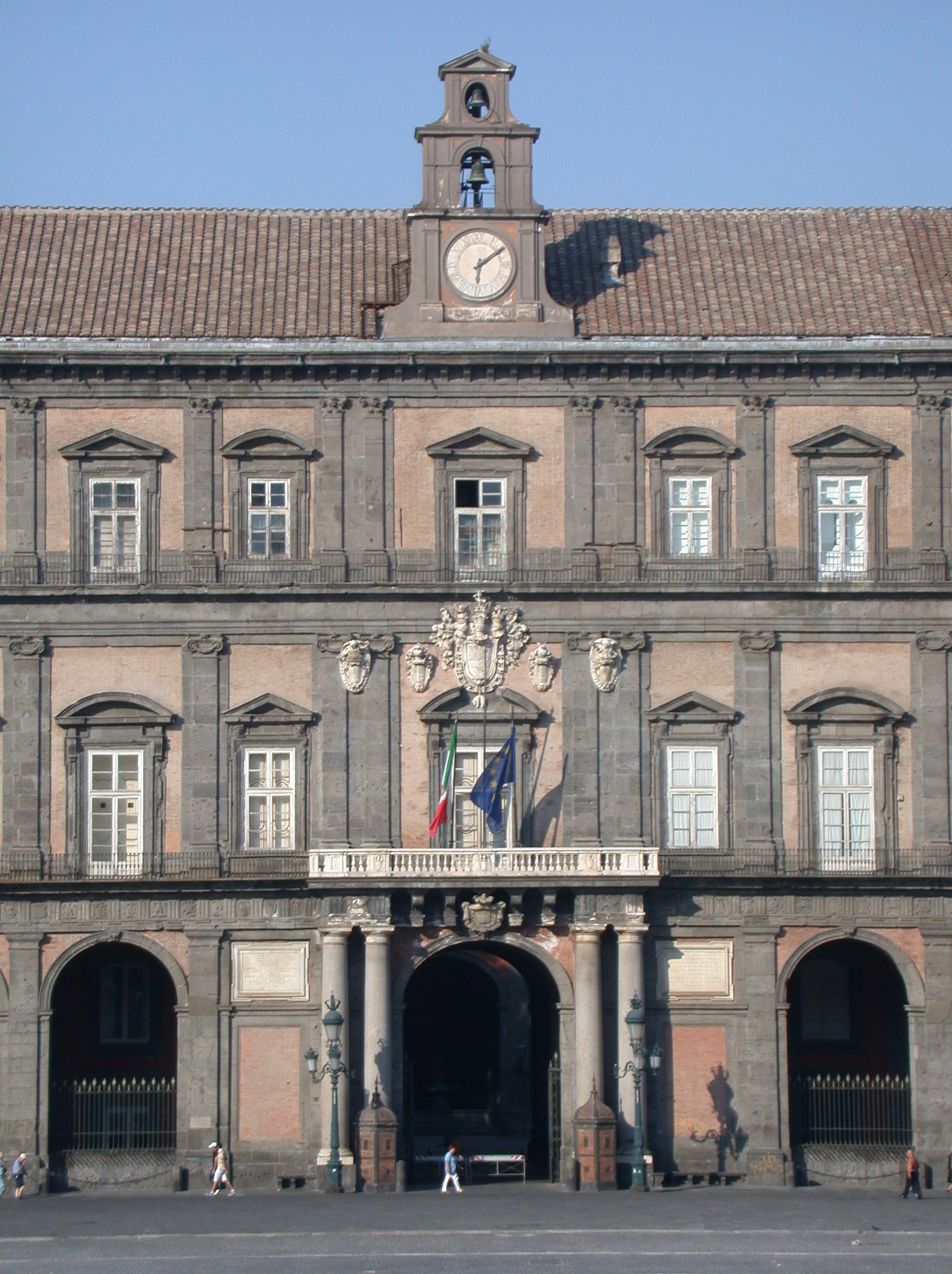 Italia, regione Campania, Napoli, Palazzo Reale, facciata su piazza del Plebiscito, parte centrale con portale di ingresso